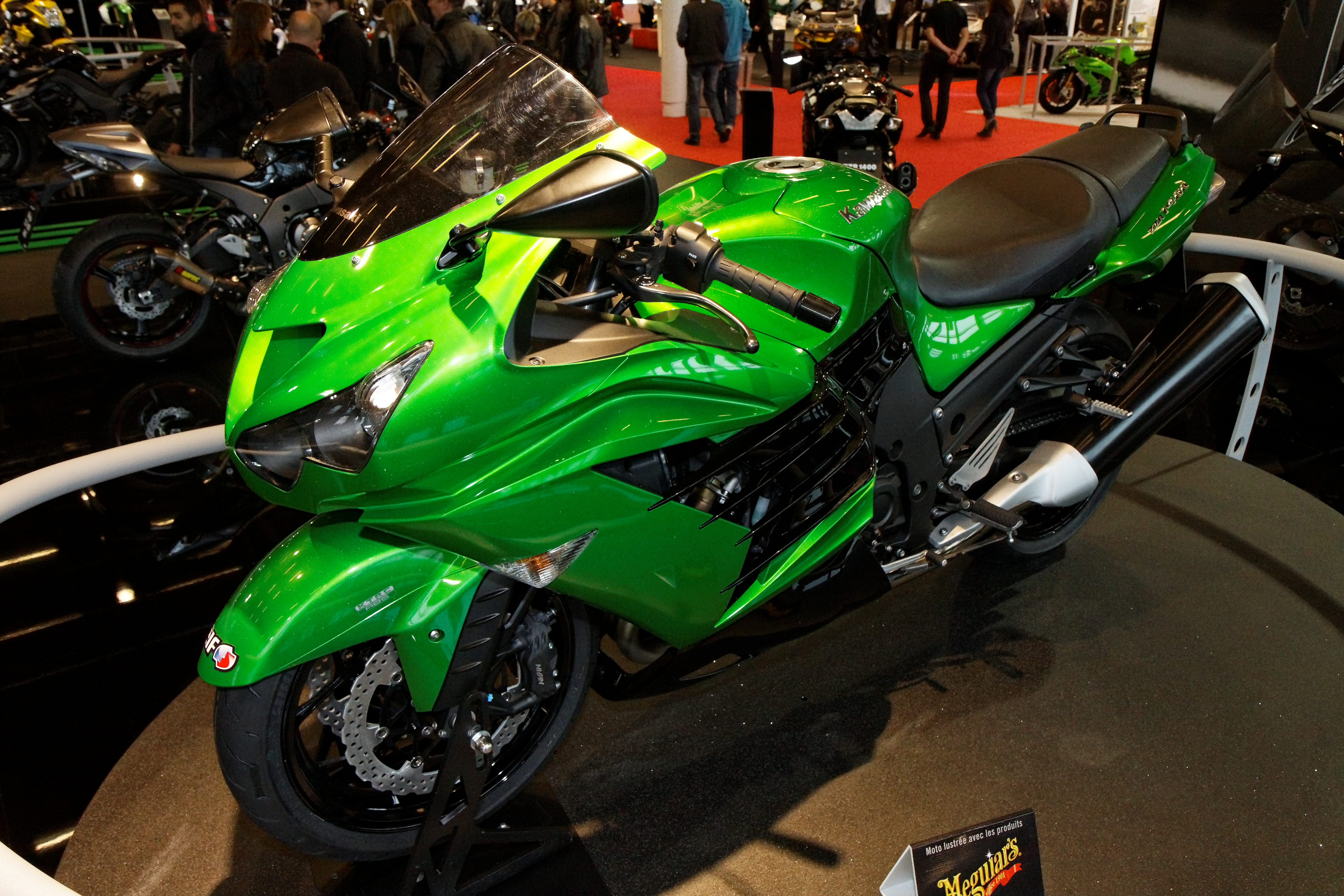 Kawasaki - ZZR 1400